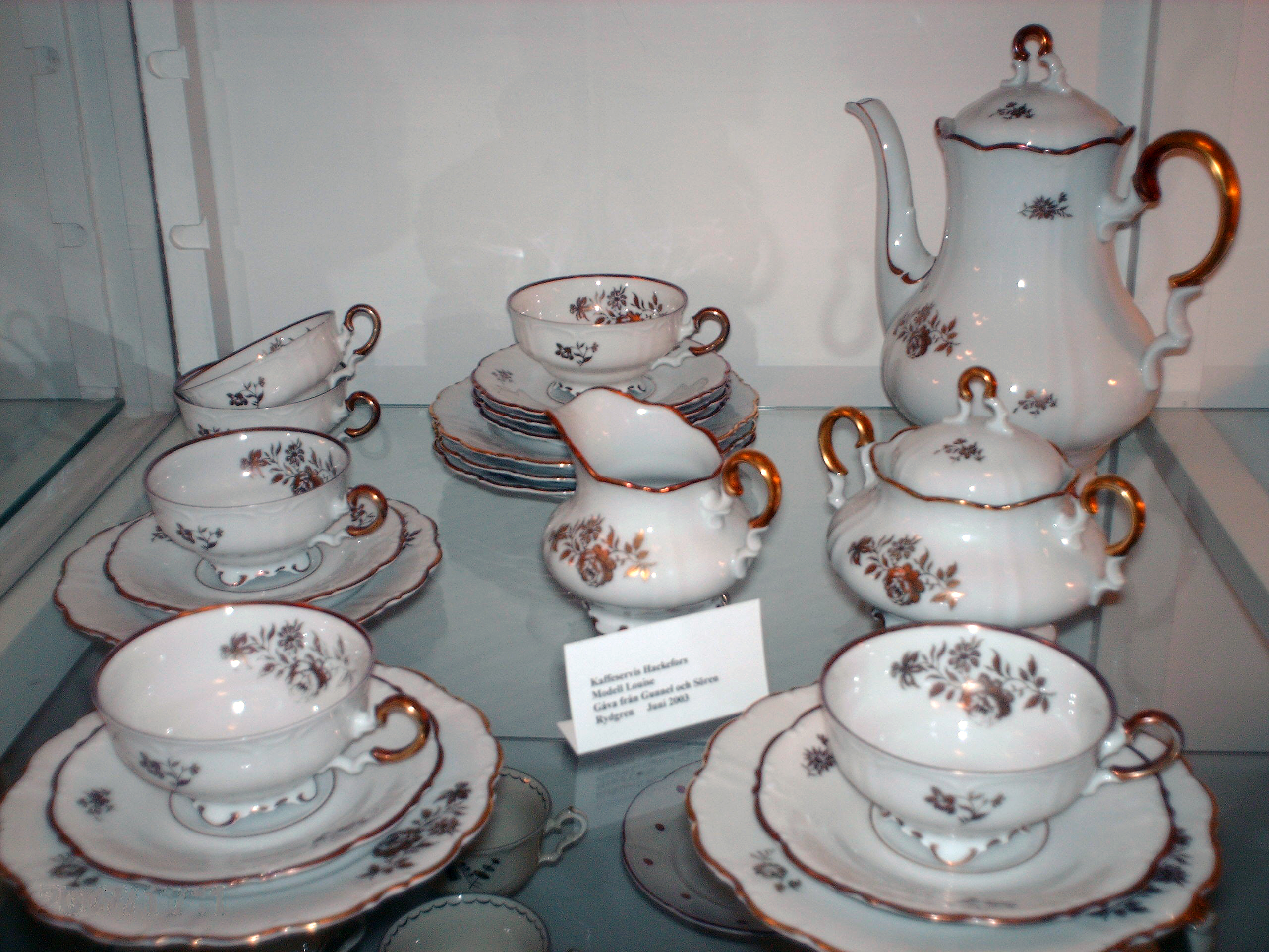 Hackefors porslinsservis